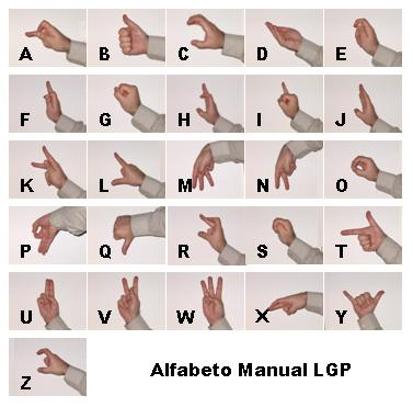 Fotografia minha, trabalho próprio.